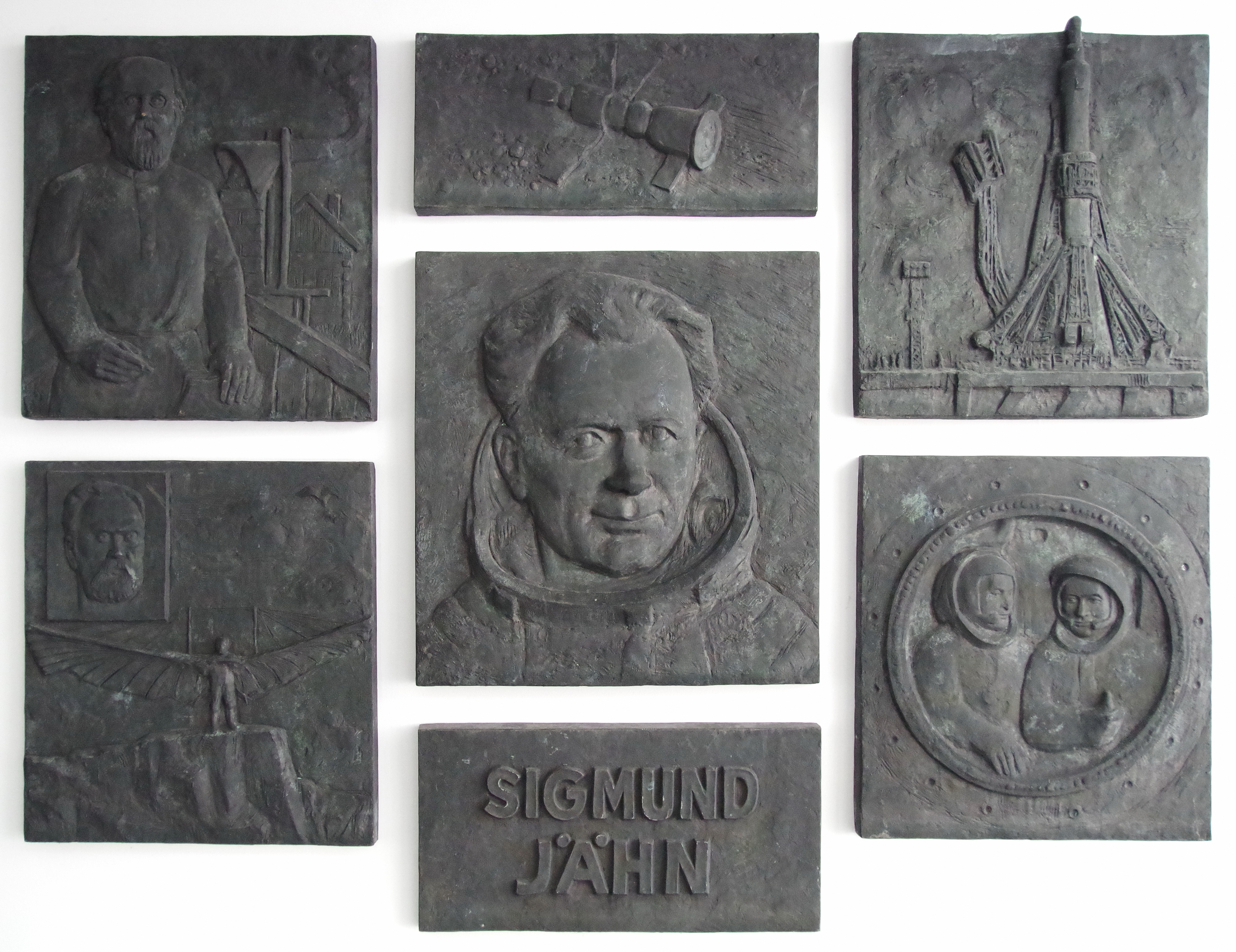 Gedenktafeln des ehemaligen Denkmals zu ehren des Weltraumfluges von Sigmund Jähn.oben links: Kanstantin Eduardowitsch Ziolkowskiunten links: Otto Lilienthaloben Mitte: Raumstation Saljut 6unten Mitte: Sigmund Jähnoben rechts: Raumschiff Sojus 31 auf Trägerrakete Sojus U beim Start in Baikonurunten rechts: Sigmund Jähn und Waleri Fjodorowitsch Bykowski